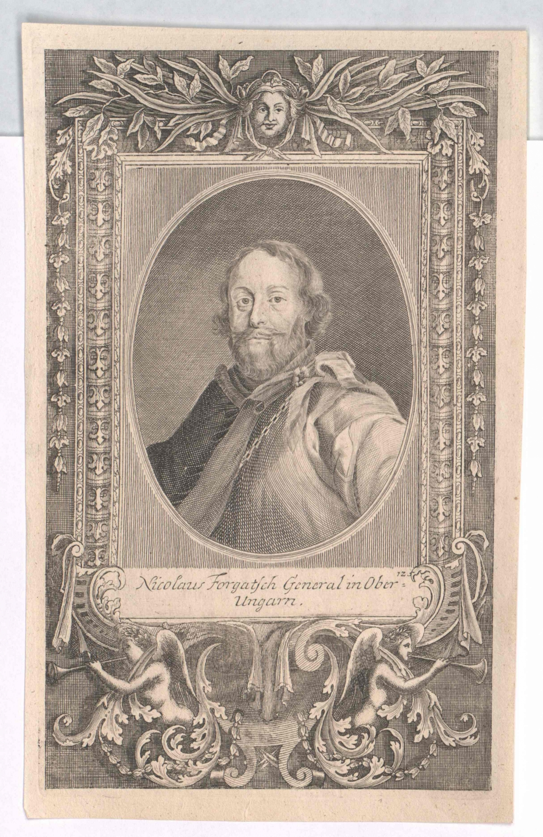 Forgách von Ghymes und Gács, Miklós Graf (1586 - 1635)